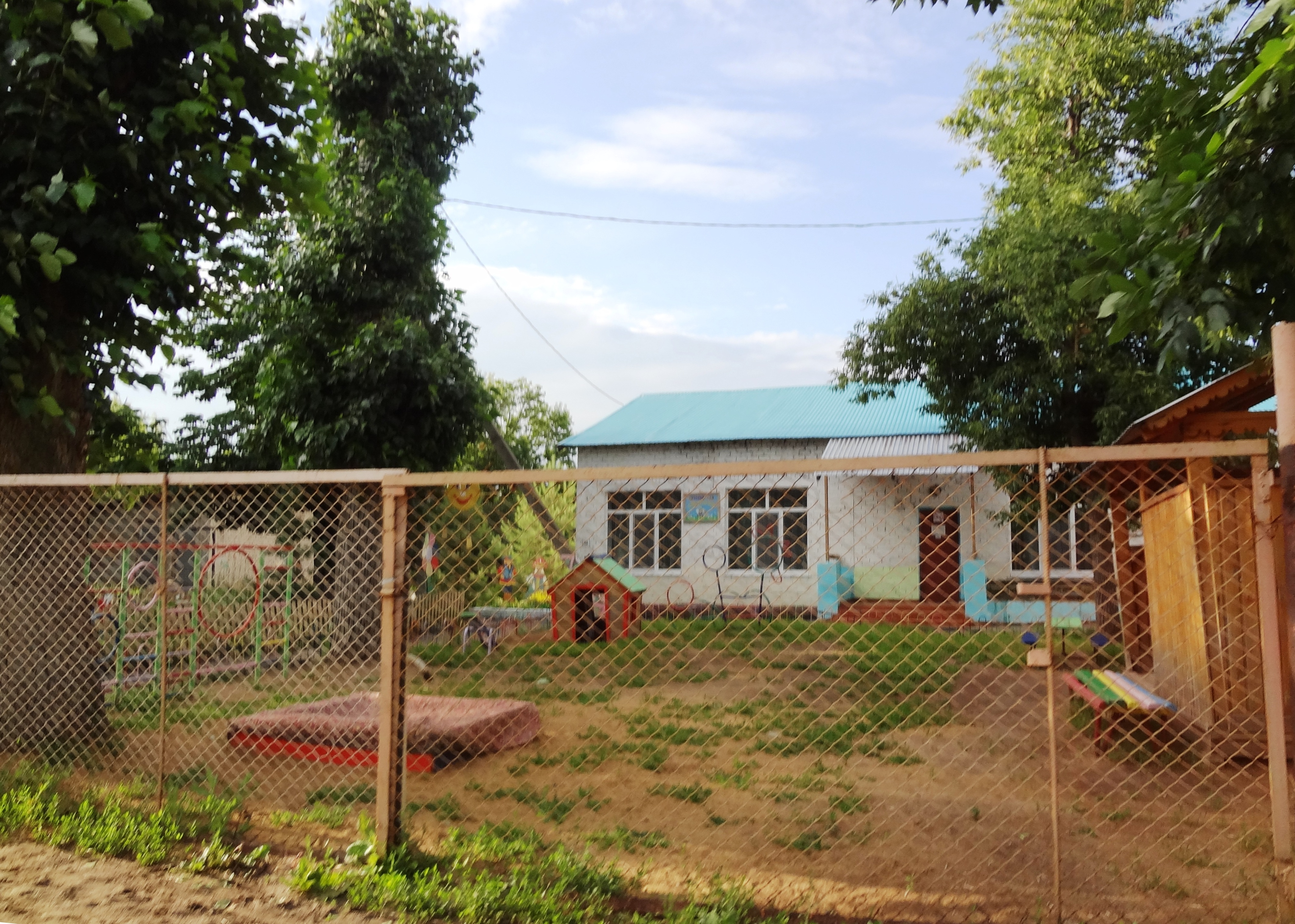 Детский сад Светлячок. Поселок Осинки Самарская область